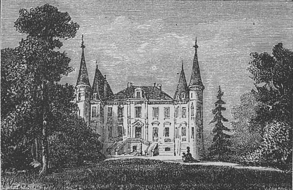 Illustration du Château Pichon-Longueville dans l'ouvrage Bordeaux et ses vins (6ème édition) de Charles Cocks et Edouard Féret publié en 1893